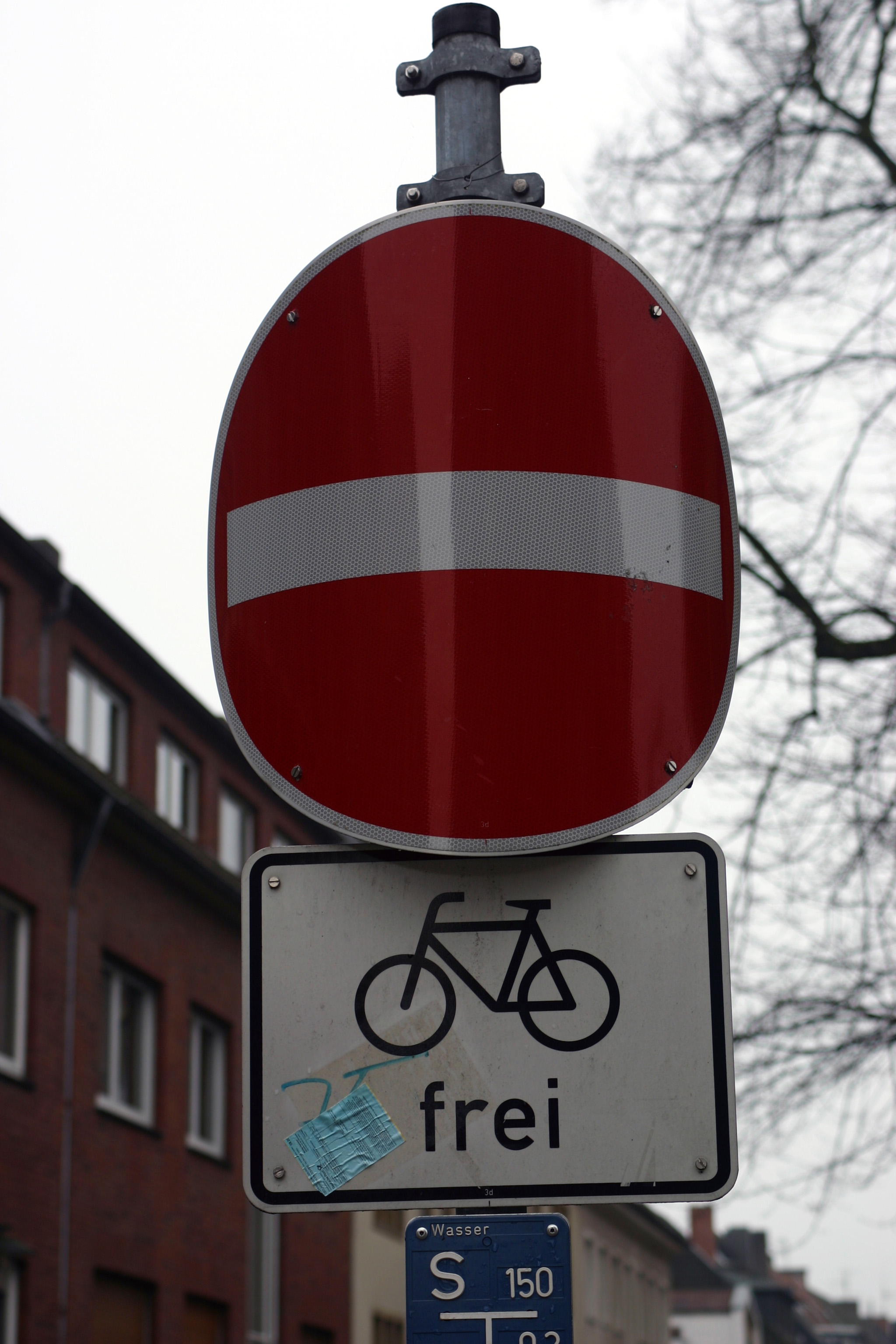 "Radfahrer frei" ist ein in Münster gern gesehenes Verkehrszeichen